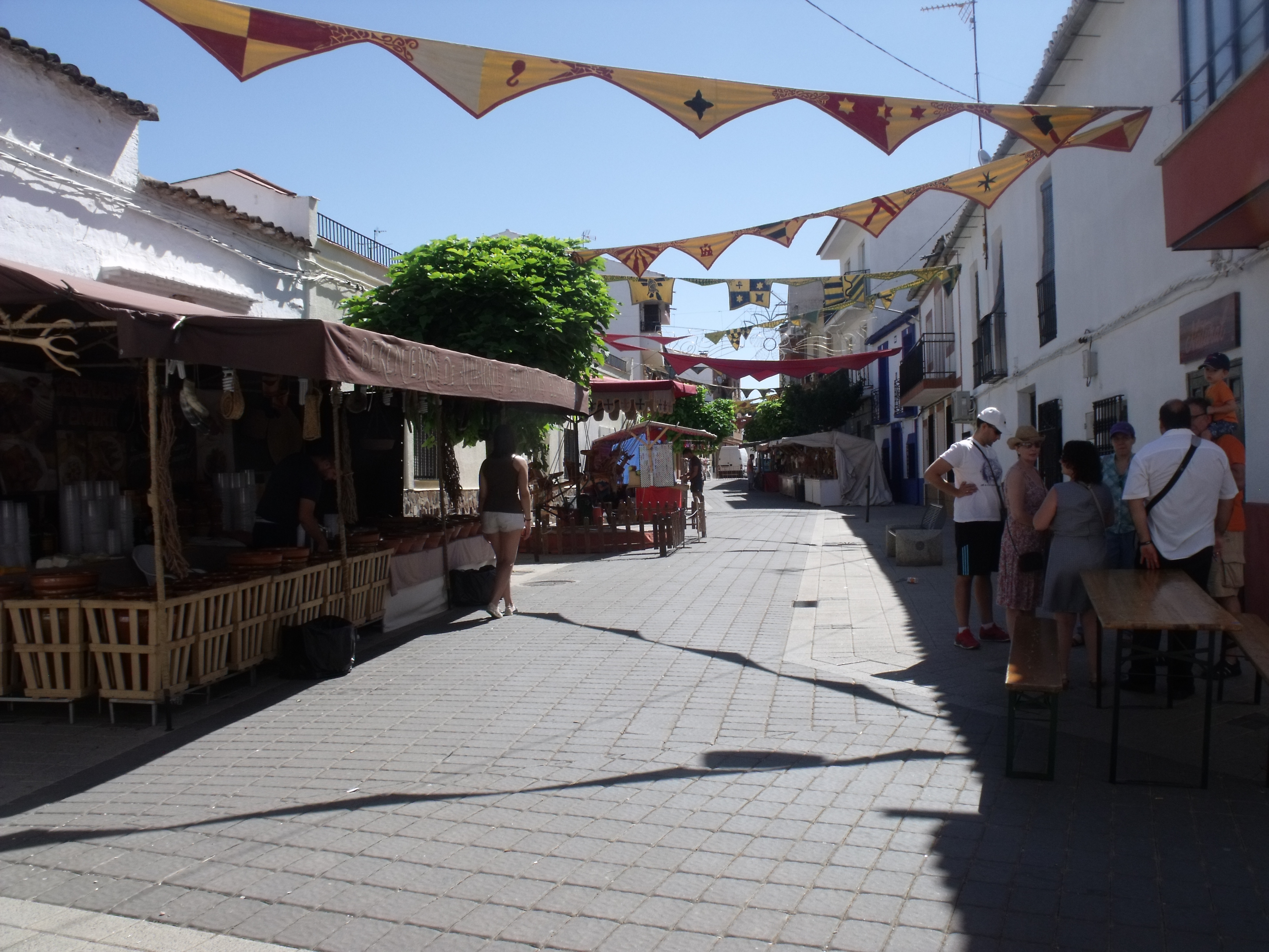 detalle de las calles en fiesta